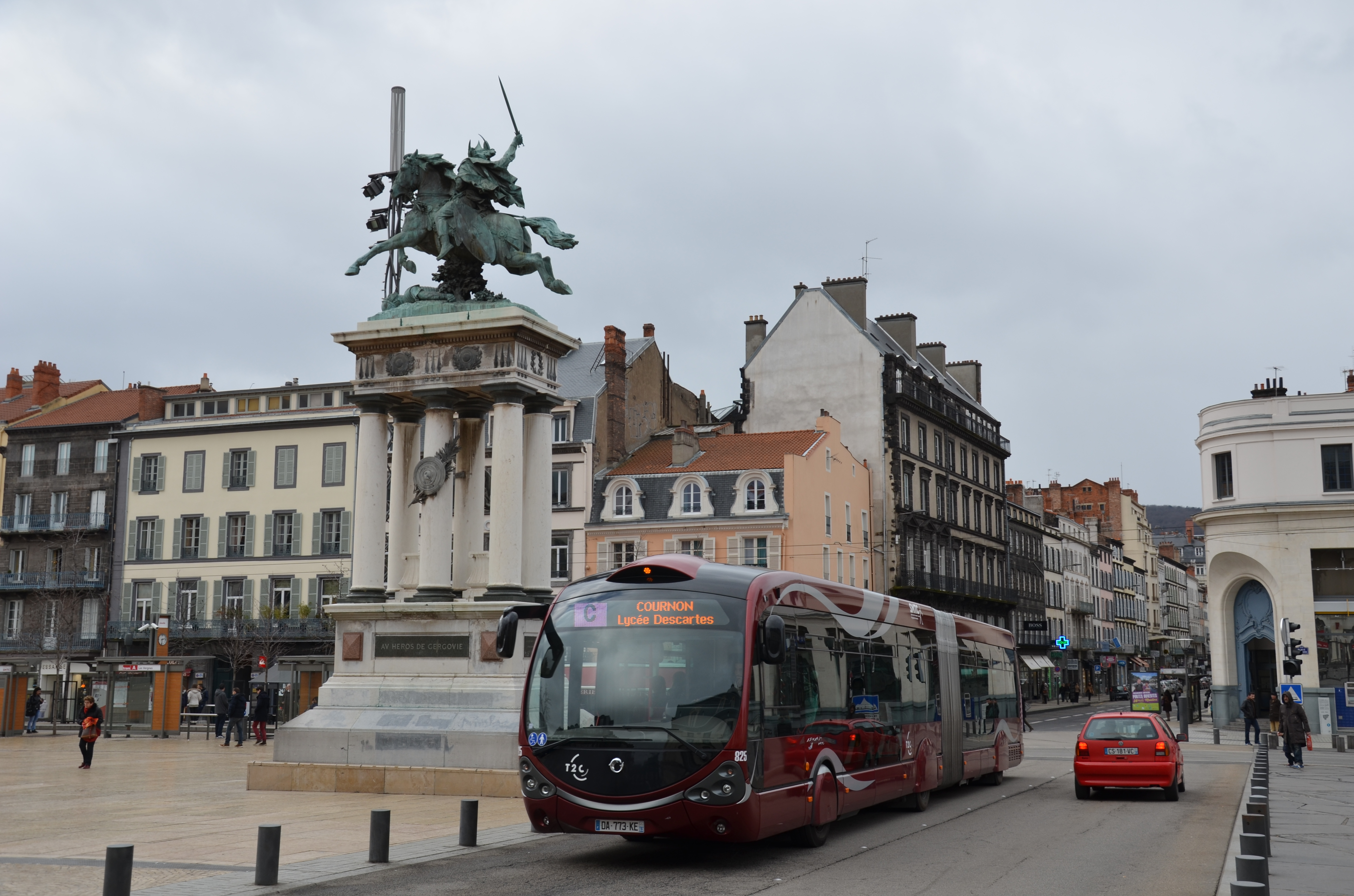 Irisbus Crealis Neo 18 n°825 de la ligne C du réseau T2C de Clermont-Ferrand, à Jaude.